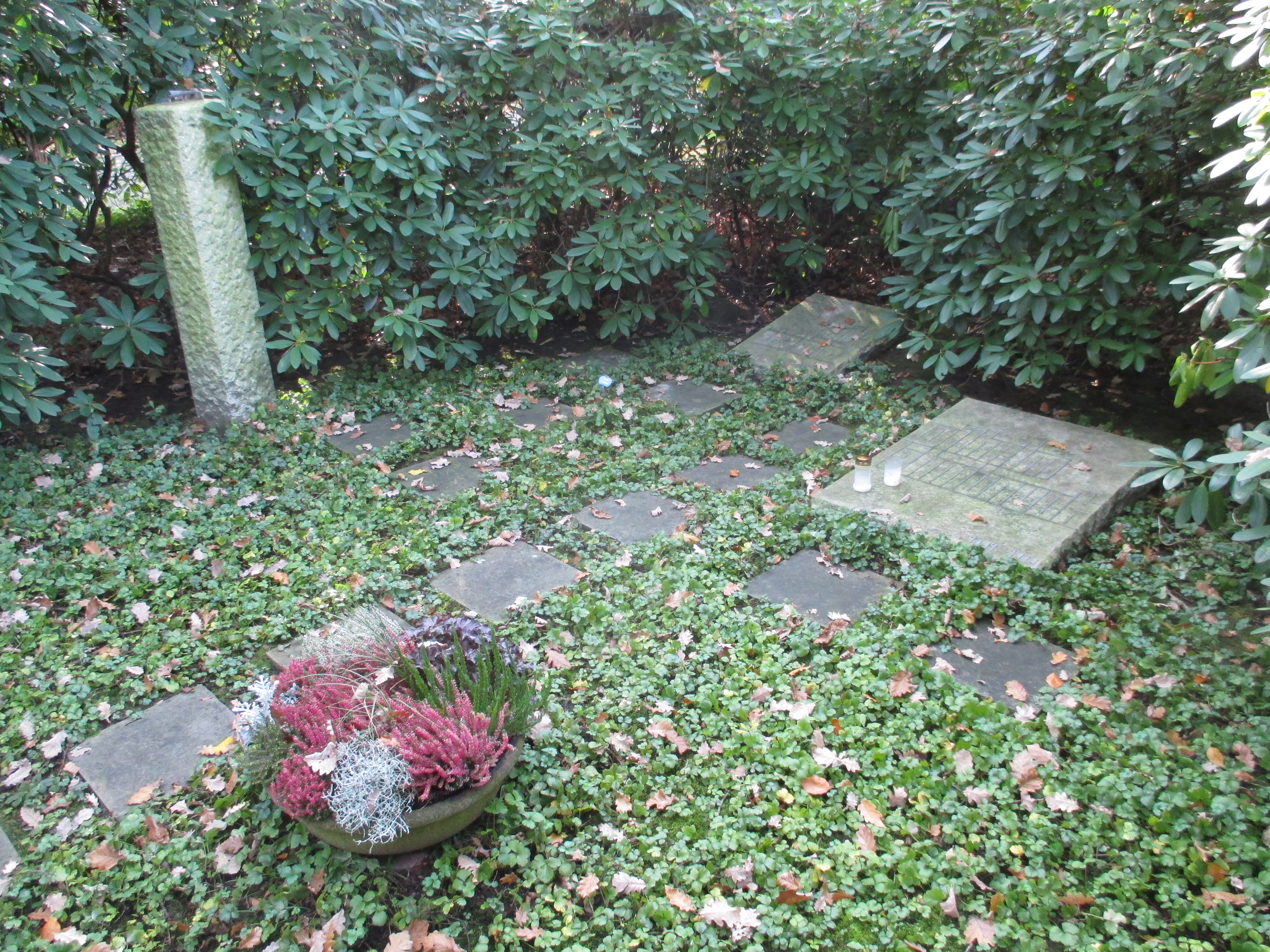 Grab von Wilhelm und Anita Lehmbruck. Der Künstler ist auf dem Waldfriedhof in Duisburg begraben.